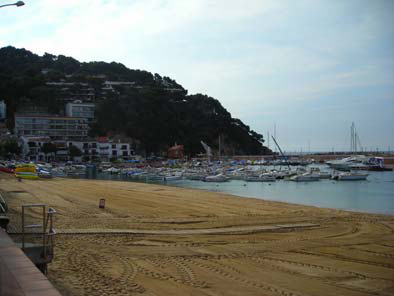 Llafranc